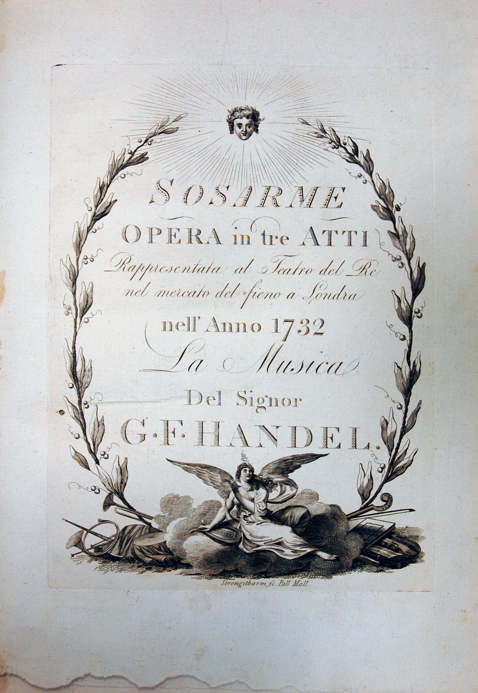 Frontispício da edição de Sosarme